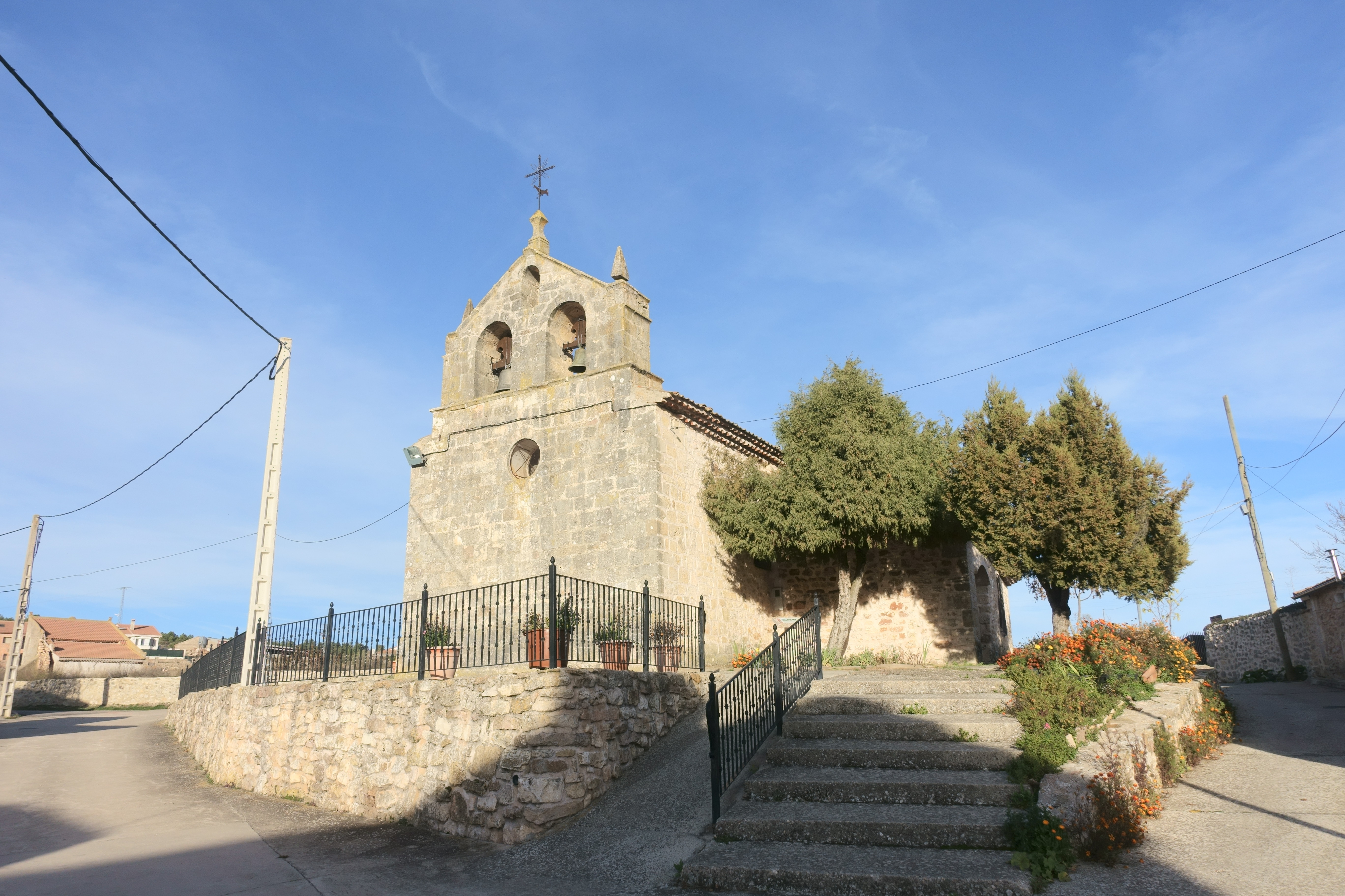 Iglesia de San Juan Degollado, Carabias (Segovia, España).